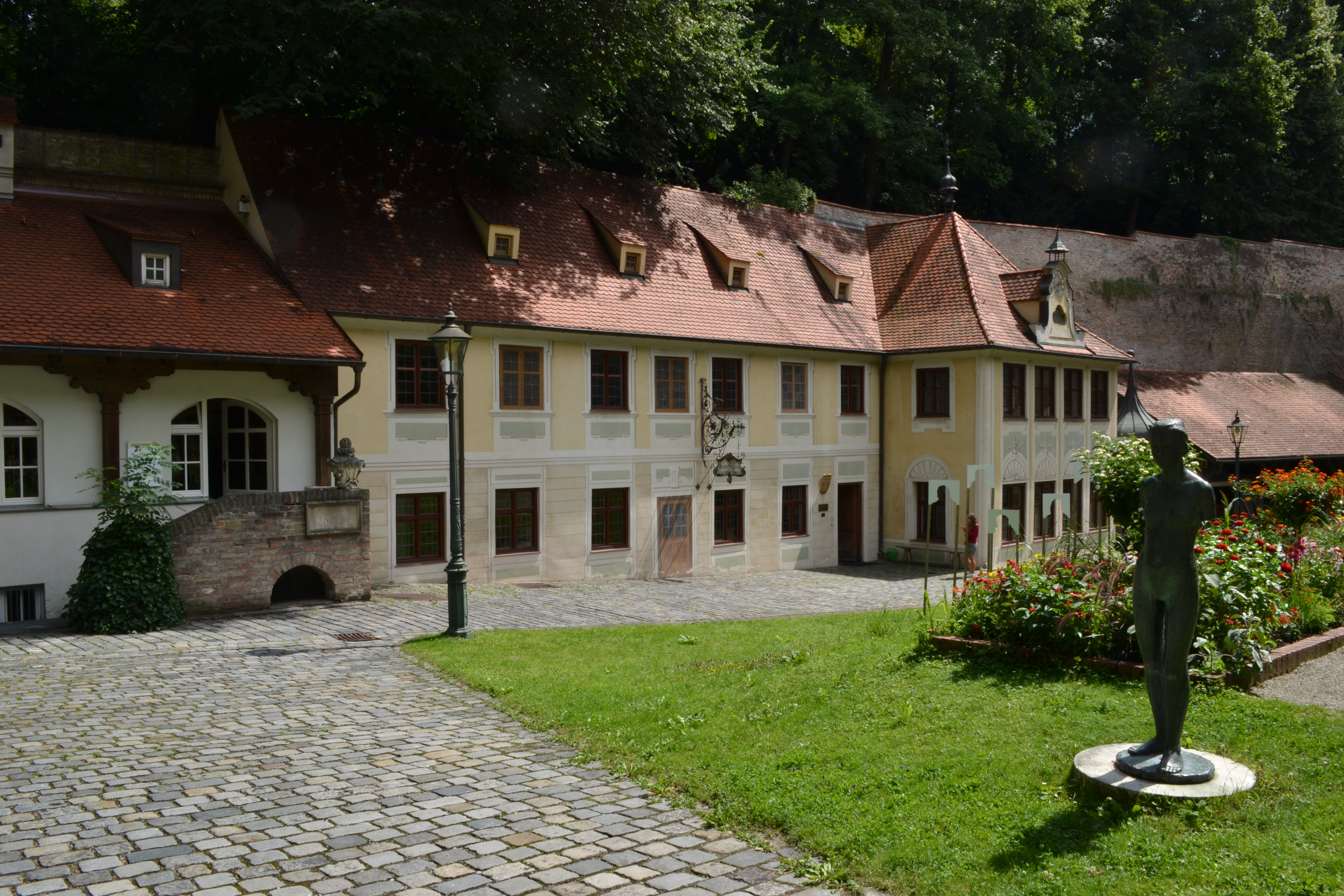 Das schwäbische Handwerkermuseum bei den Wassertürmen in Augsburg.